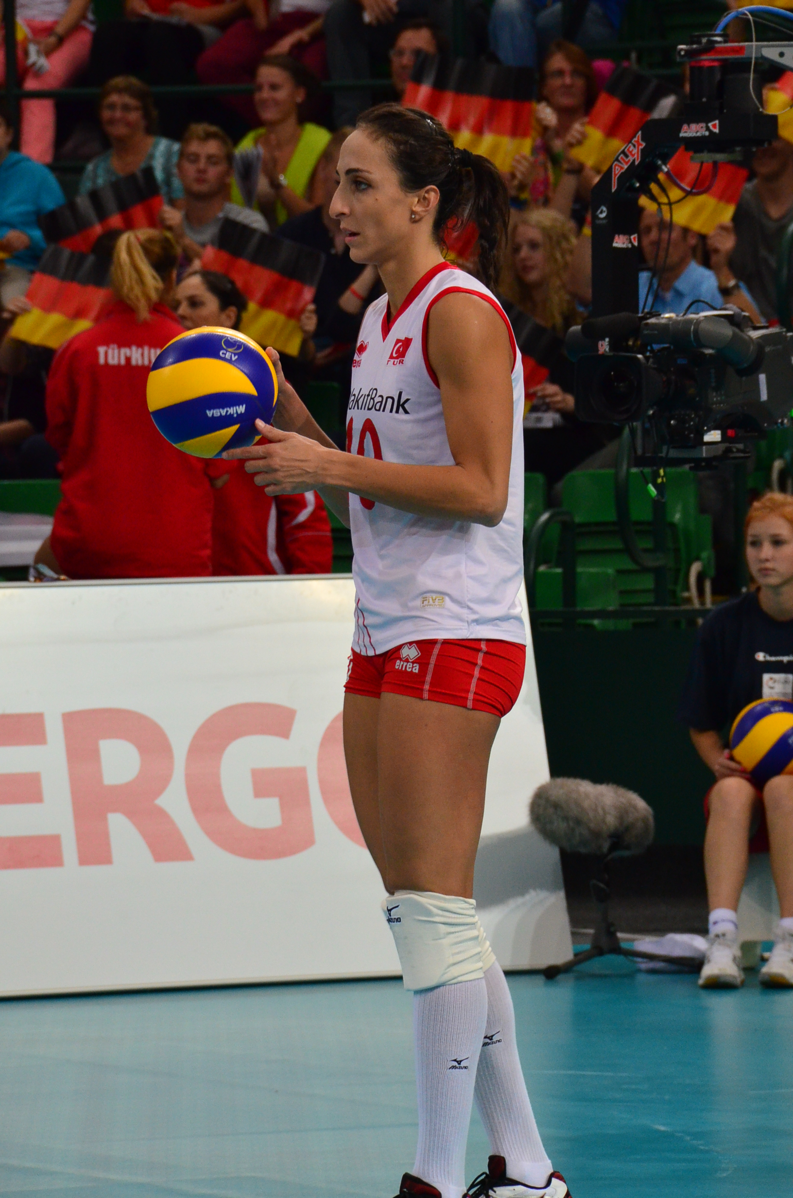 Volleyball-Europameisterschaft der Frauen 2013-Spielort Halle (Westf) Gerry-Weber-Stadion - Spiel 8. September 2013 (Deutschland-Türkei)